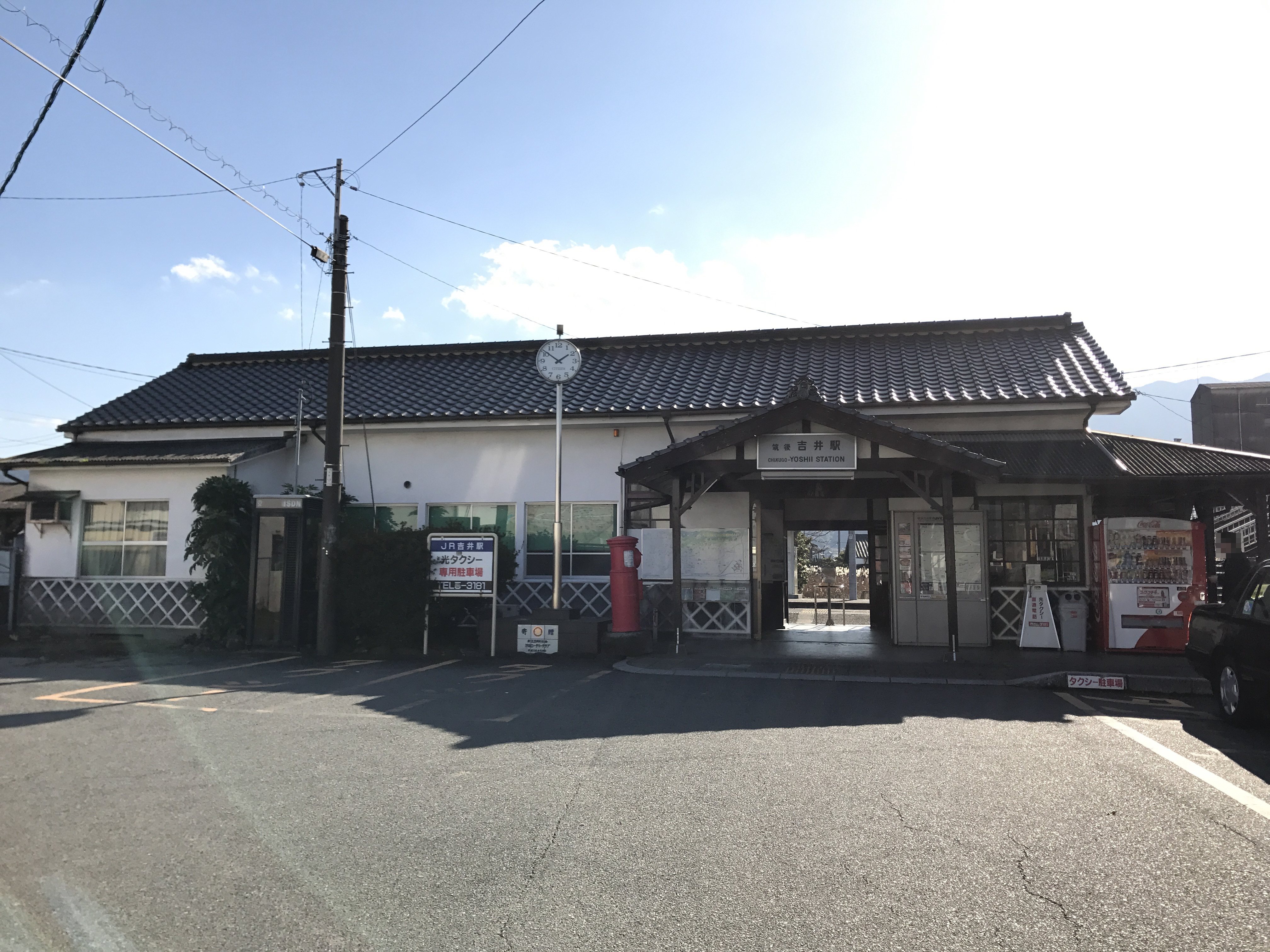 筑後吉井駅駅舎